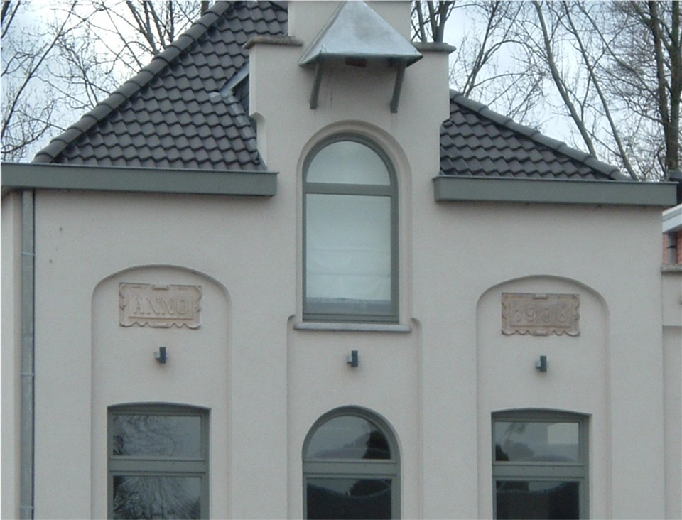 Drukkerij Witteryck, detail: gevelsteen '2008'.